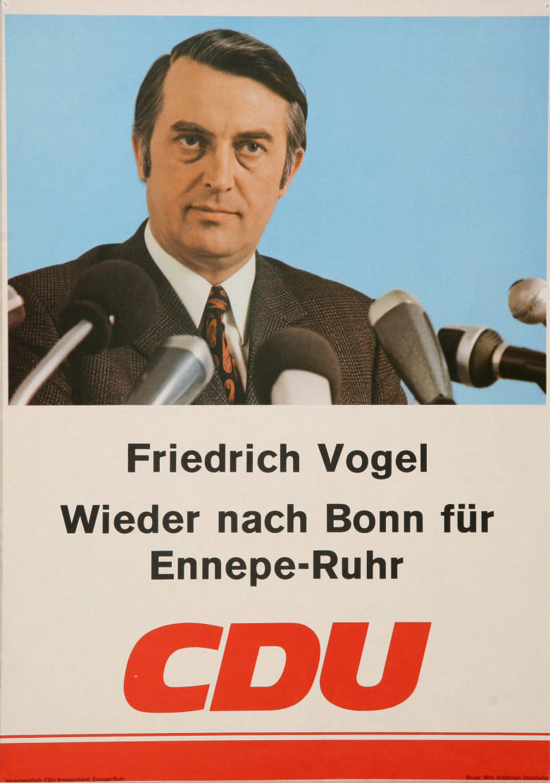 Friedrich Vogel Wieder nach Bonn für Ennepe-Ruhr CDU Abbildung: Porträtfoto Plakatart: Kandidaten-/Personenplakat mit Porträt Auftraggeber: CDU Kreisverband Ennepe-Ruhr Drucker_Druckart_Druckort: Willy Größchen, Dortmund Objekt-Signatur: 10-001: 1540 Bestand: Plakate zu Bundestagswahlen (10-001) GliederungBestand10-18: Plakate zu Bundestagswahlen (10-001) » Die 7. Bundestagswahl am 19. November 1972 » CDU » Mit Porträtfoto Lizenz: KAS/ACDP 10-001: 1540 CC-BY-SA 3.0 DE